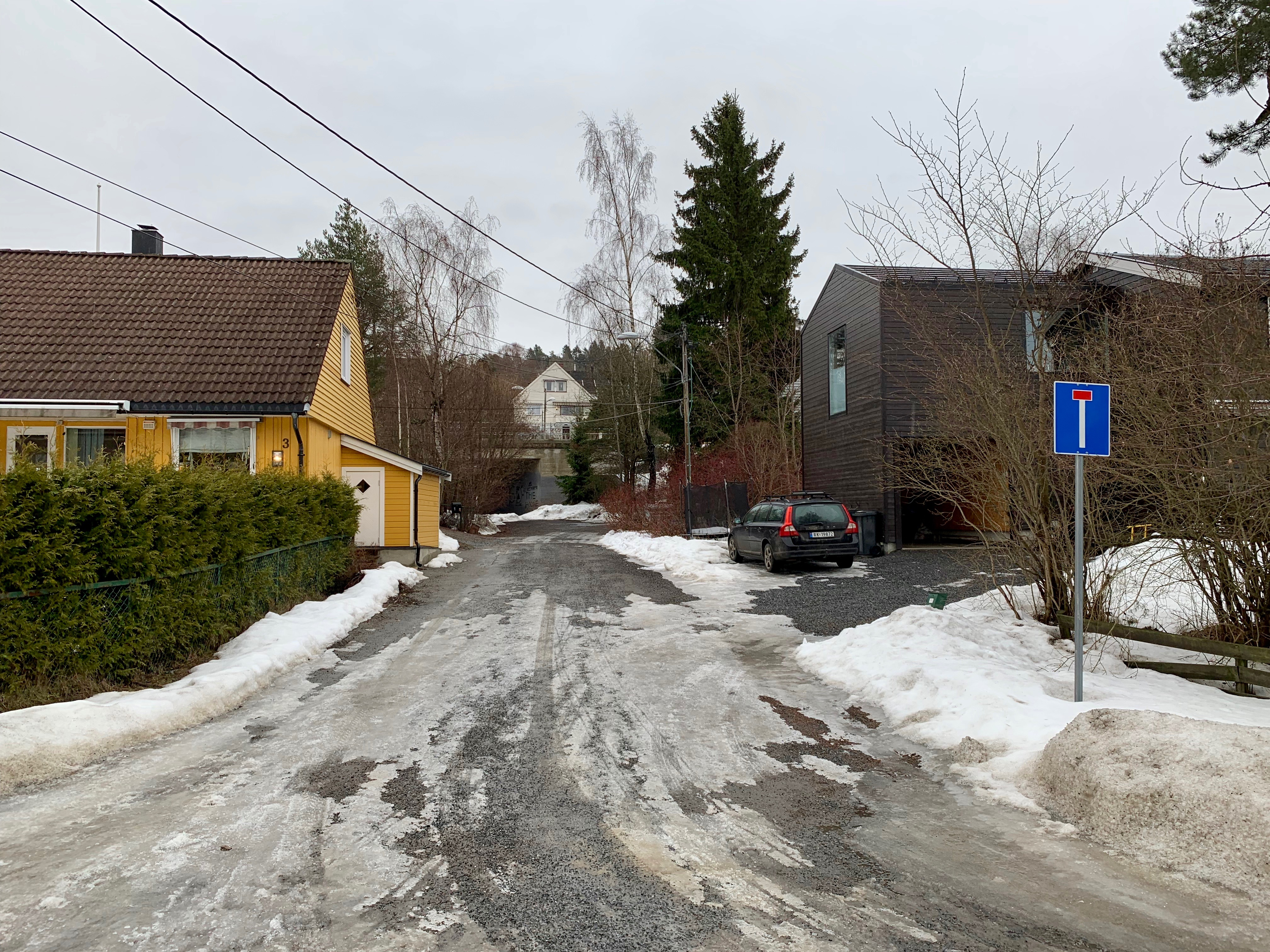 Godliasvingen, på Godlia i Bydel Østensjø i Oslo.